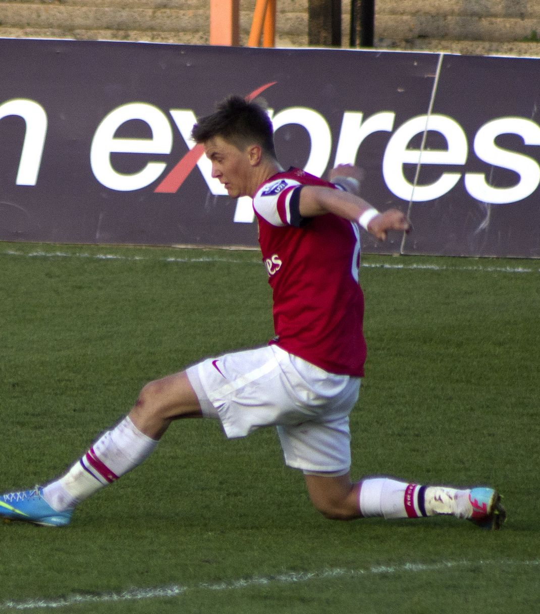 Kristoffer Olsson sous le maillot d'Arsenal en 2012